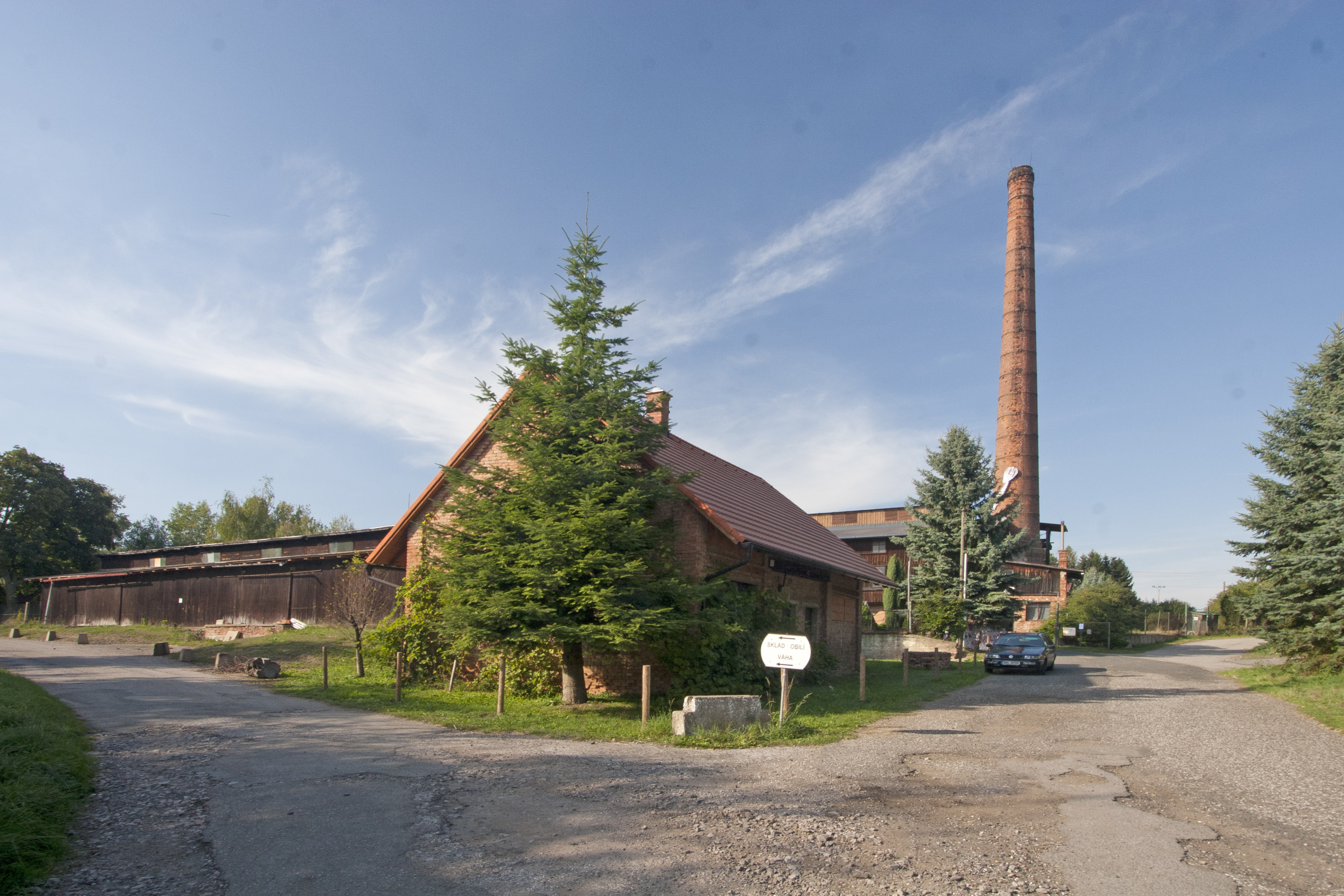 Šárovcova Lhota - bývalá cihelna